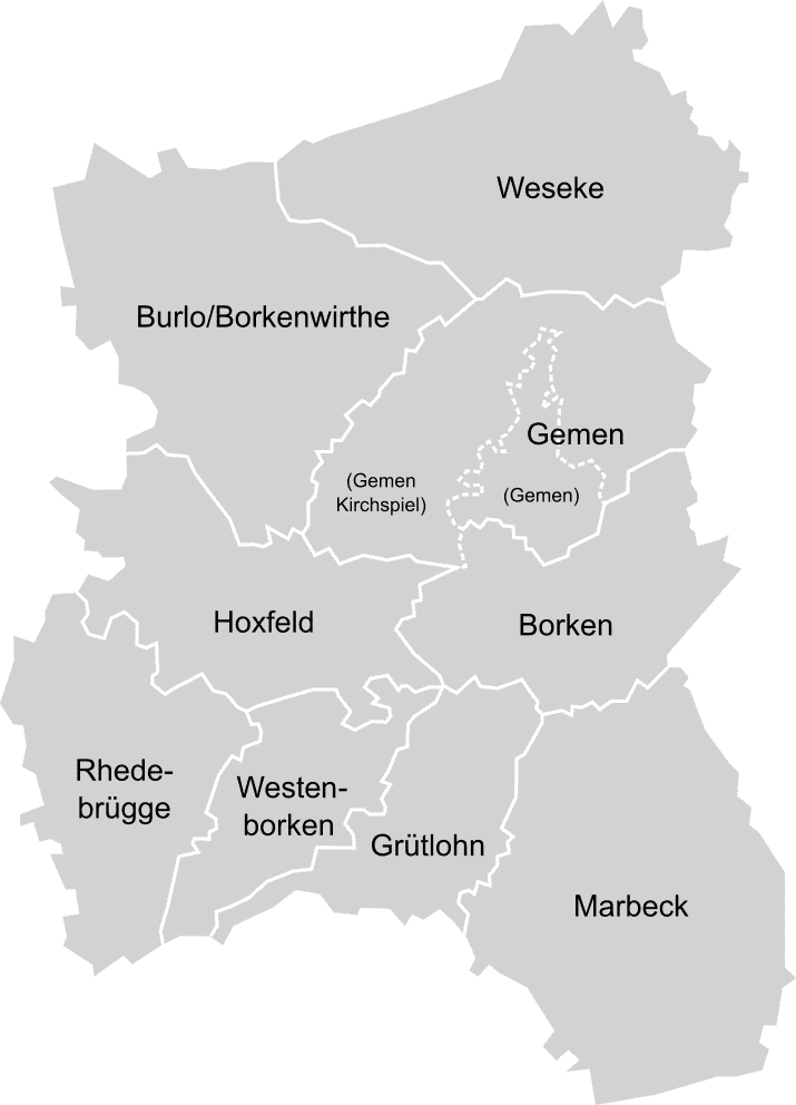 Stadtteile von Borken